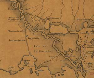 CARTE DE LA RIVIÈRE DE MISSISSIPPI - Illustration par Guillaume Delisle, géographe de l'Academie des Sciences - Source: Library of Congress Map Collection 1500 -2004